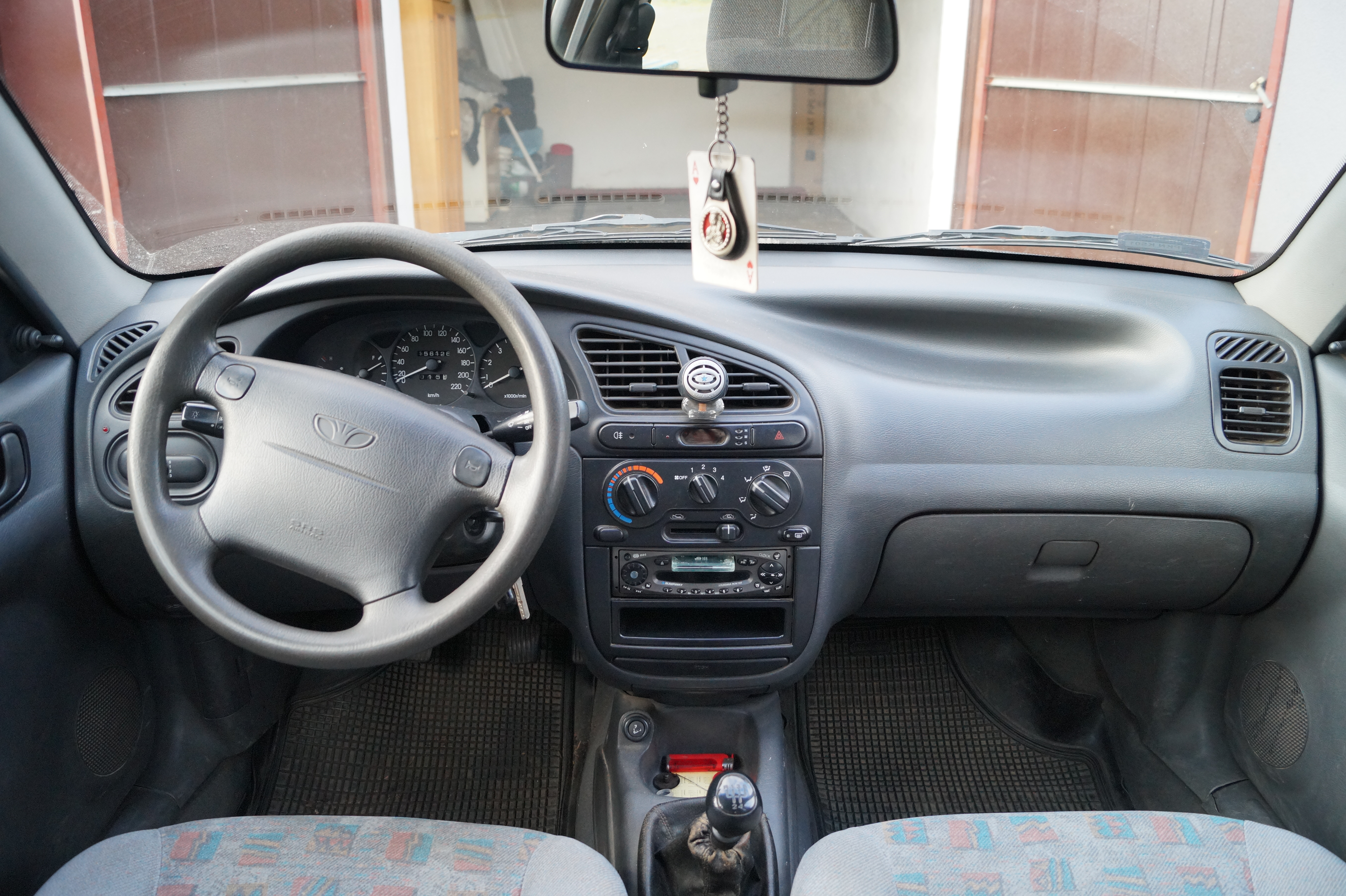 Deska rozdzielcza Daewoo Lanosa T100 sedan w wersji SE